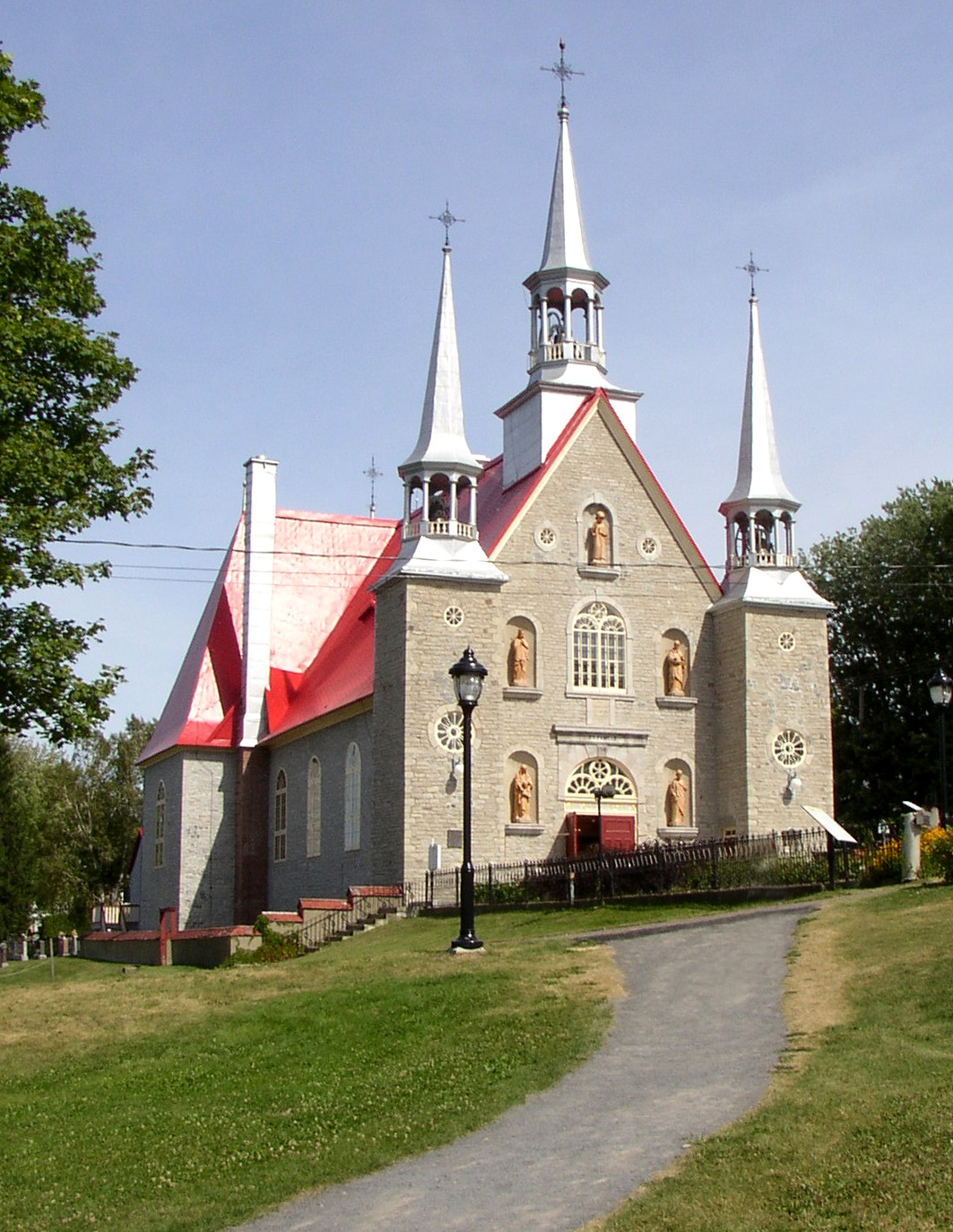 Église de la Sainte-Famille, 3915, chemin Royal, Sainte-Famille (Île d'Orléans), Québec, Canada. Église érigée de 1743 à 1747, classée monument historique en 1980. Photo taken by uploader. Williamborg 02:53, 22 July 2006 (UTC)